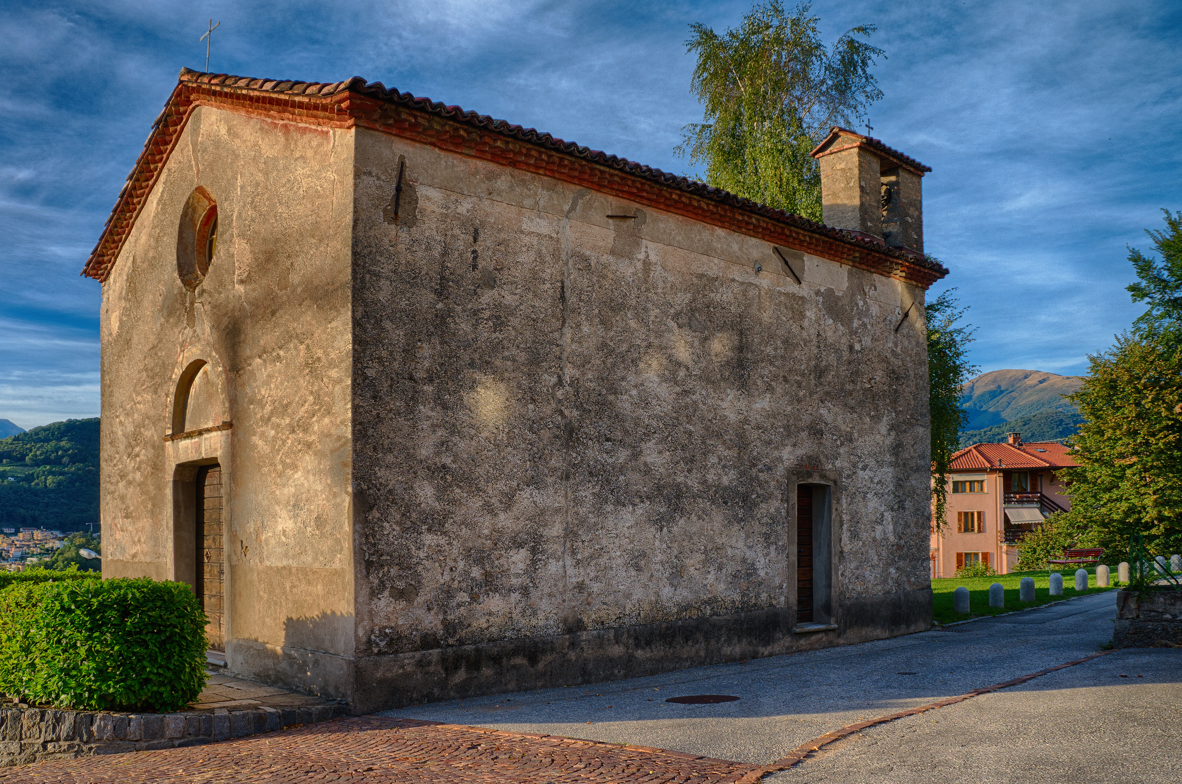 L’oratorio dei santi Pietro e Paolo sorge ad Orlino, all’incrocio fra via san Pietro e via Selvapiana. È un edificio che risale al XIII secolo.